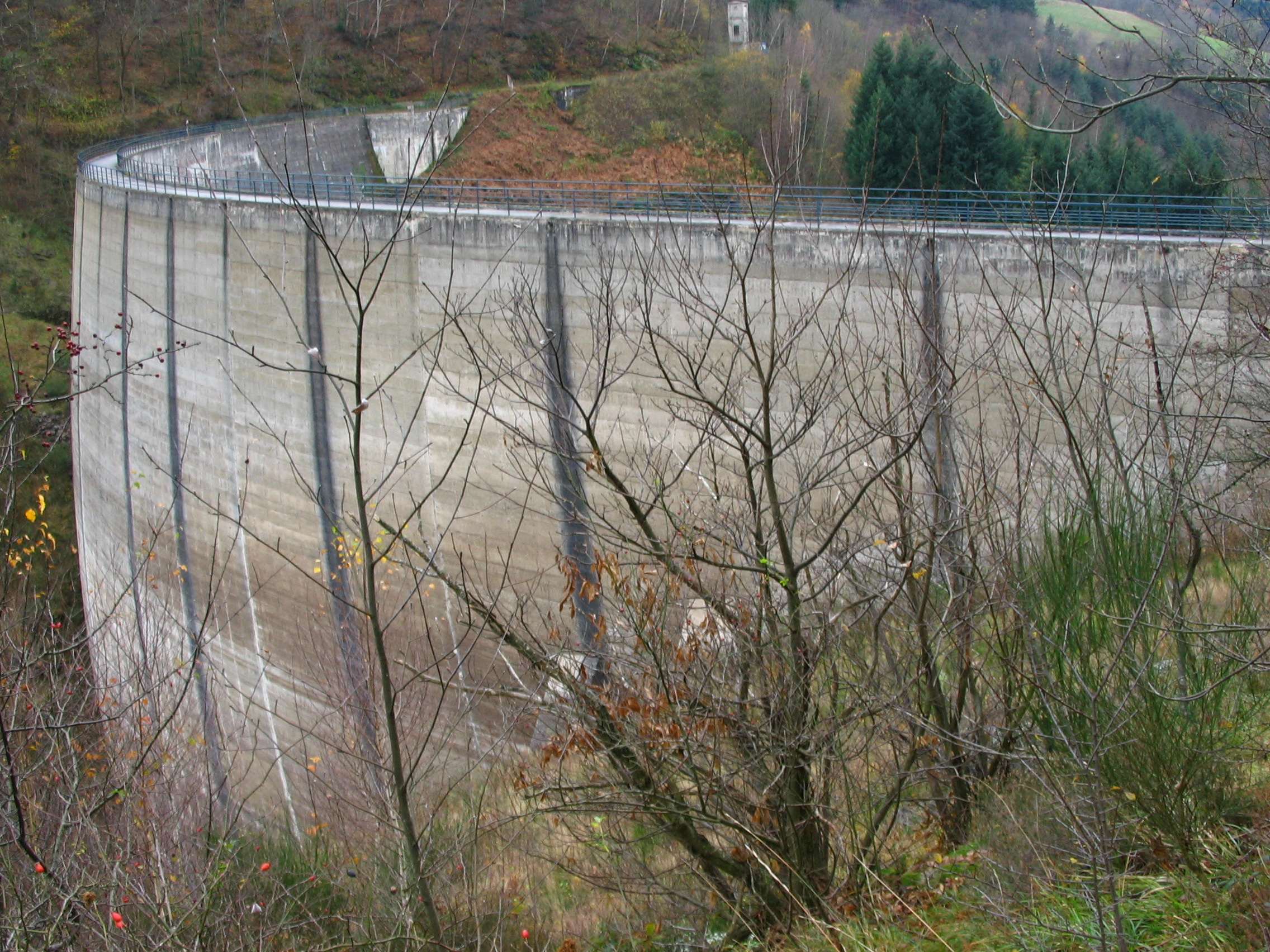 Barrage désaffecté du Piney (Loire) - vue amont du mur.